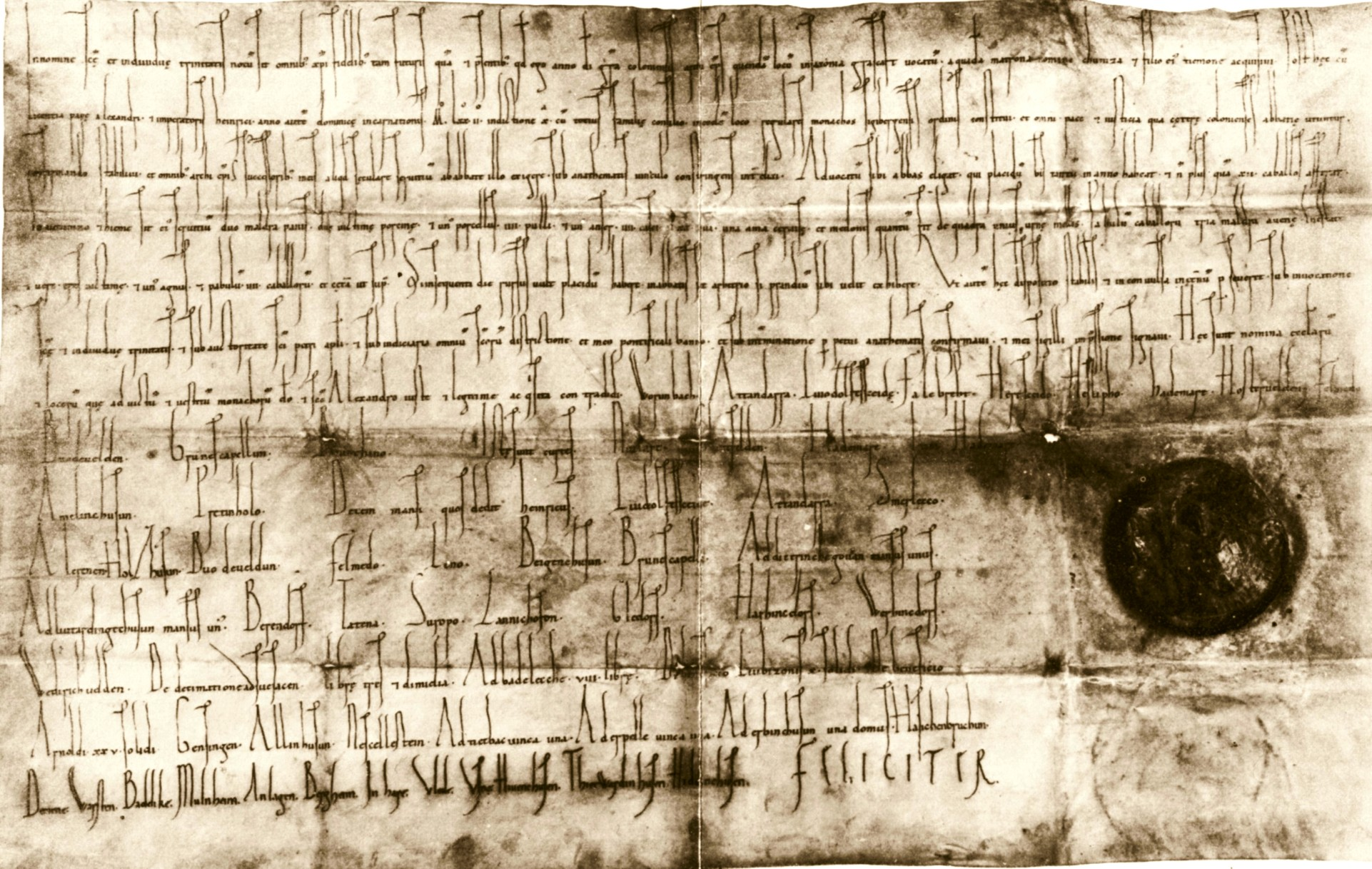 Gründungsurkunde Kloster Grafschaft 1072